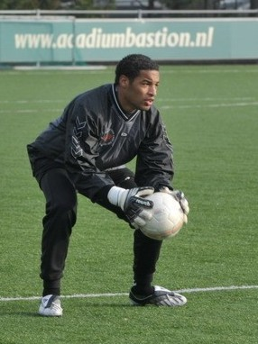 Gino Coutinho, de goed coachende keeper. Aangezien Boy Waterman, bij ADO op huurbasis, in december 2008 te horen heeft gekregen dat hij weg mag, is Gino Coutinho de beoogde reservekeeper (achter eerste keeper Robert Zwinkels).